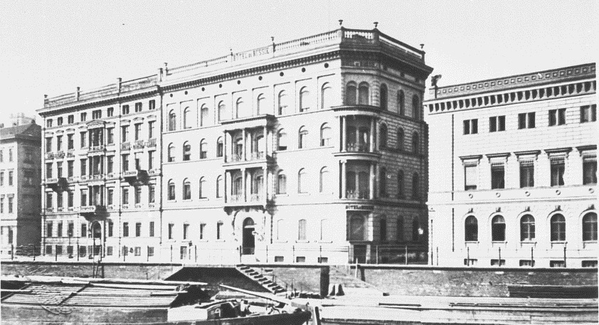 Ansicht des Berliner Hotel d'Angleterre (links) und des Hotel de Russie (Mitte) am Platz der Bauakademie (Nr. 2 und Nr. 1) sowie der Kommandantur (rechts, angeschnitten) an der Straße Unter den Linden.